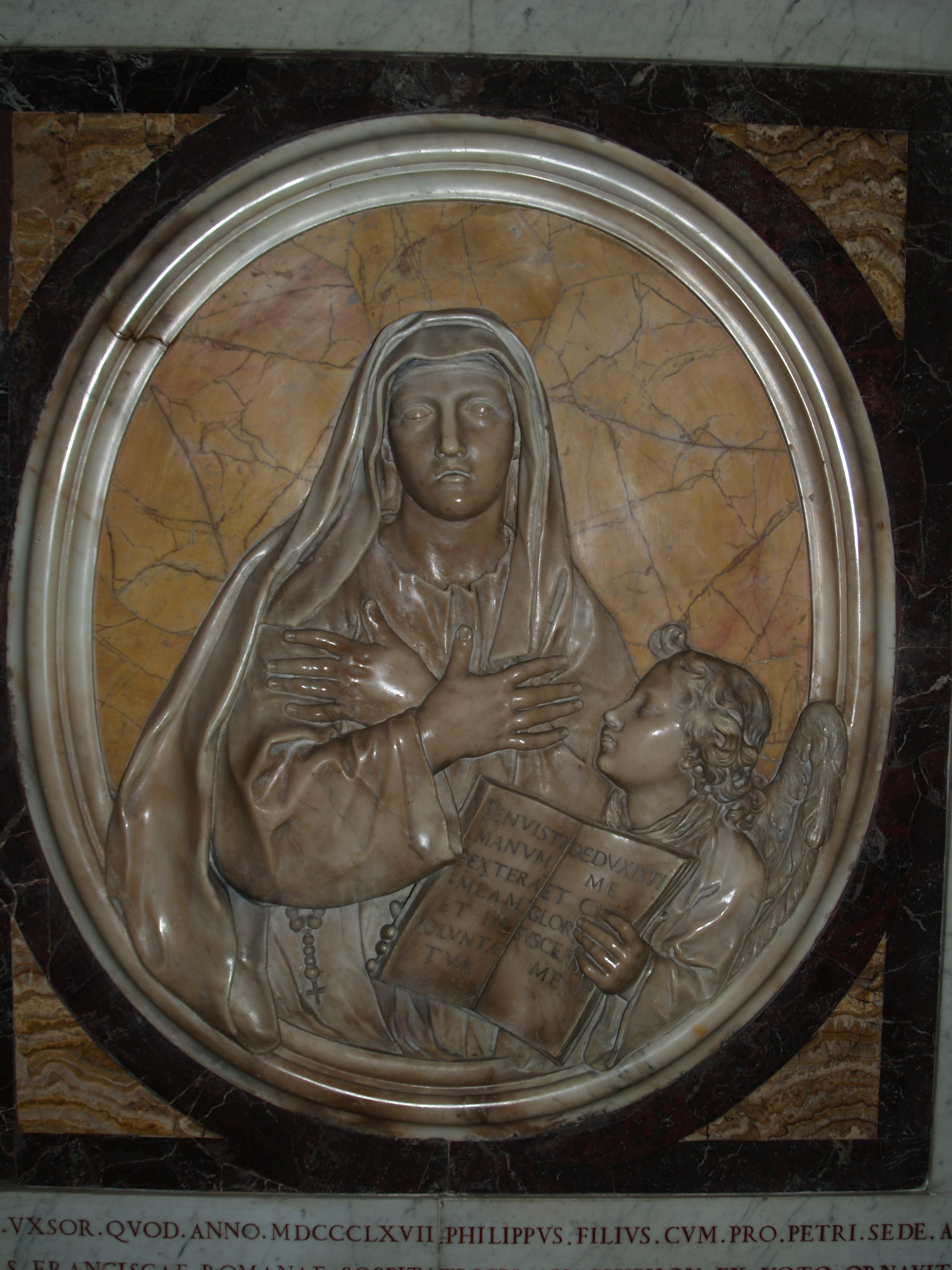 Roma. Santa Francesca Romana. Interior.